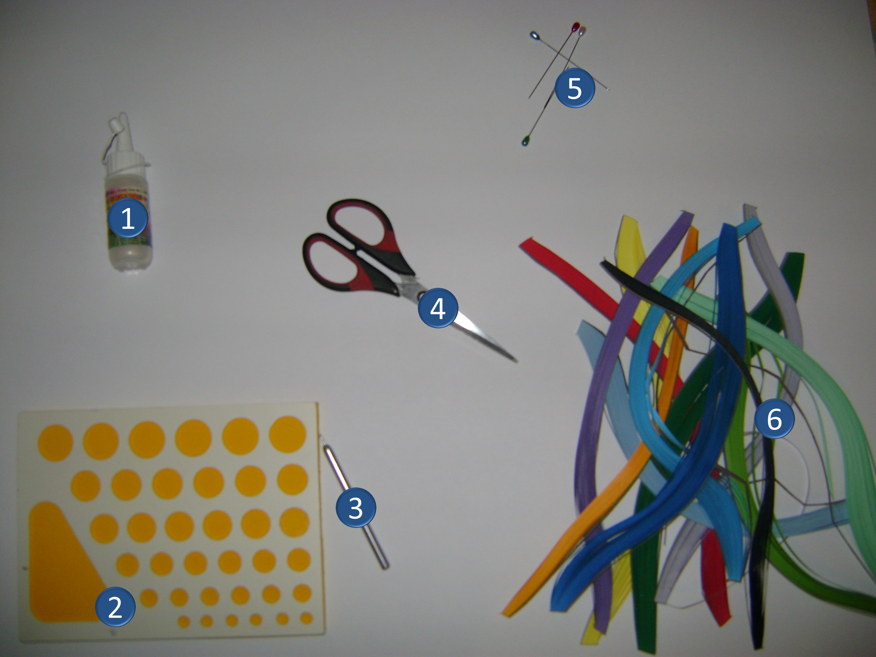 Se muestran los materiales básicos para hacer filigrana